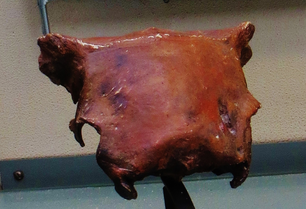 Fossil of Sylviornis, an extinct bird- Took the photo at Musee d'Histoire Naturelle, Paris